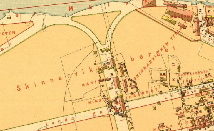 Del av Alfred Rudolf Lundgrens Stockholmskarta från 1885 visande Skinnarviksberget och den planerade sträckningen av Ringvägen.